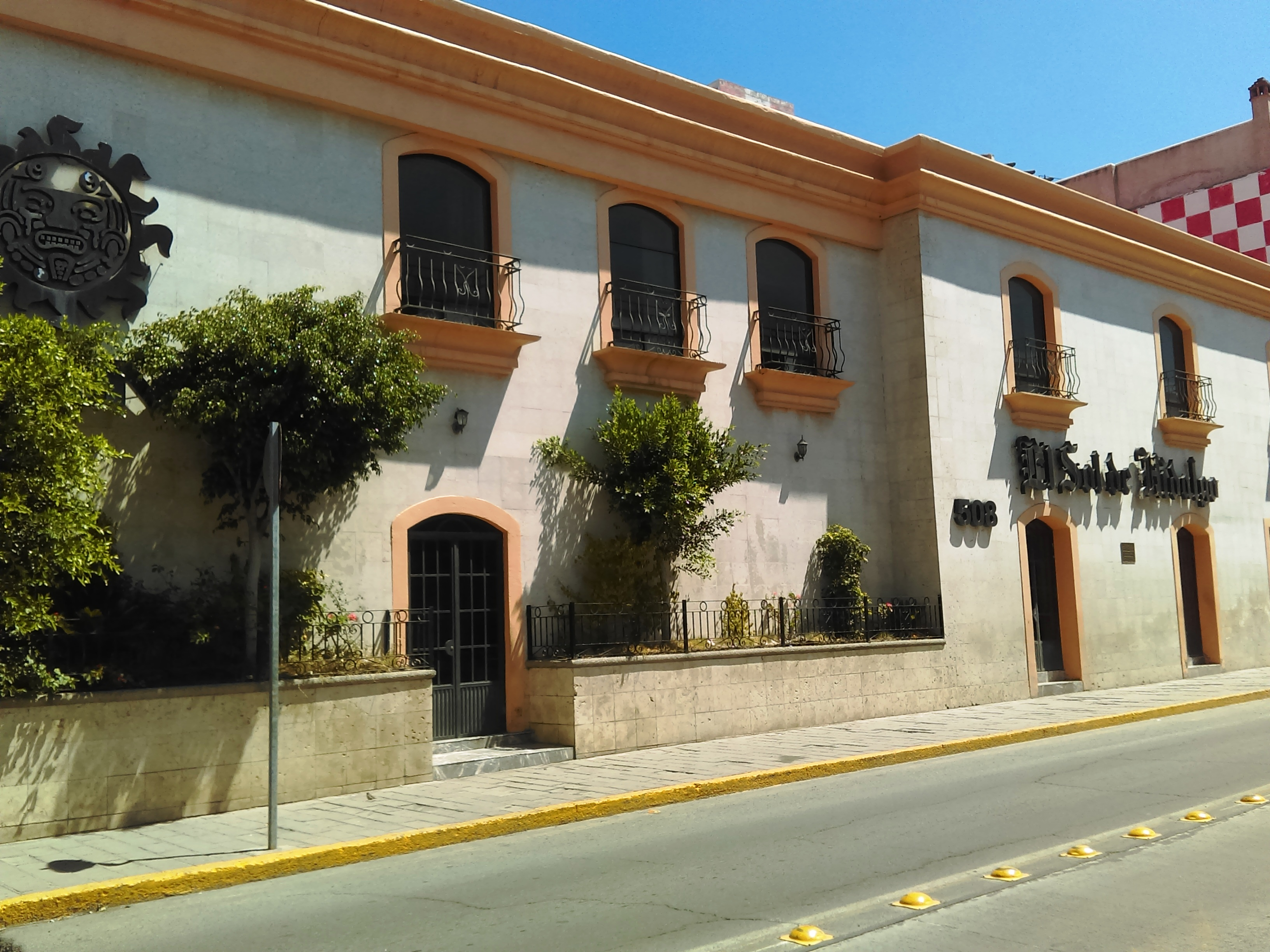 Sede de "El Sol de Hidalgo" en Pachuca, México.